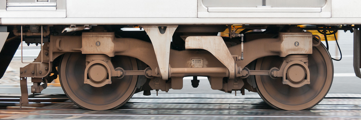 京成3000形（II）の住友金属FS564形台車。